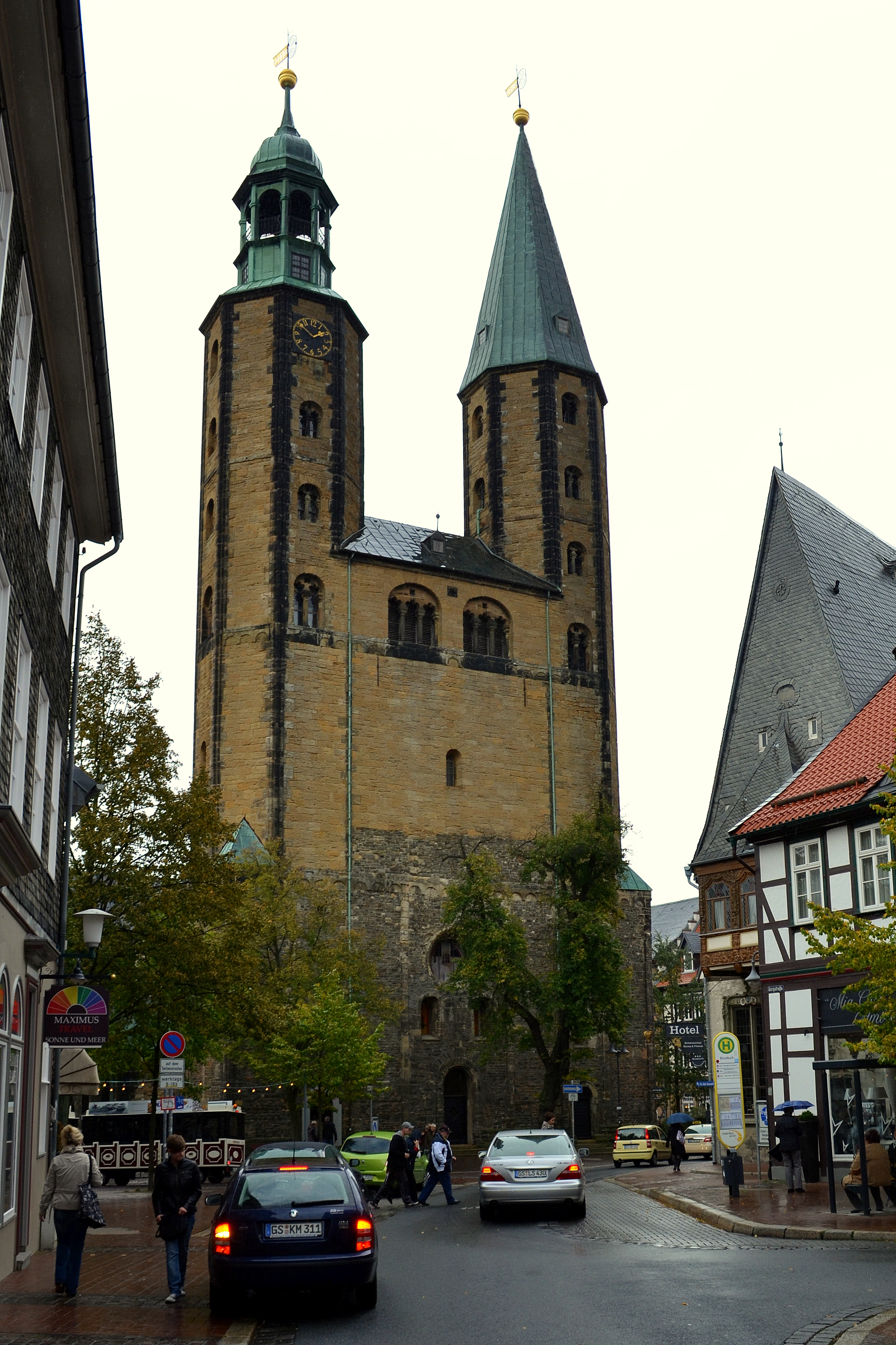 Goslar Marktkerk Cosmas en Damianus Front